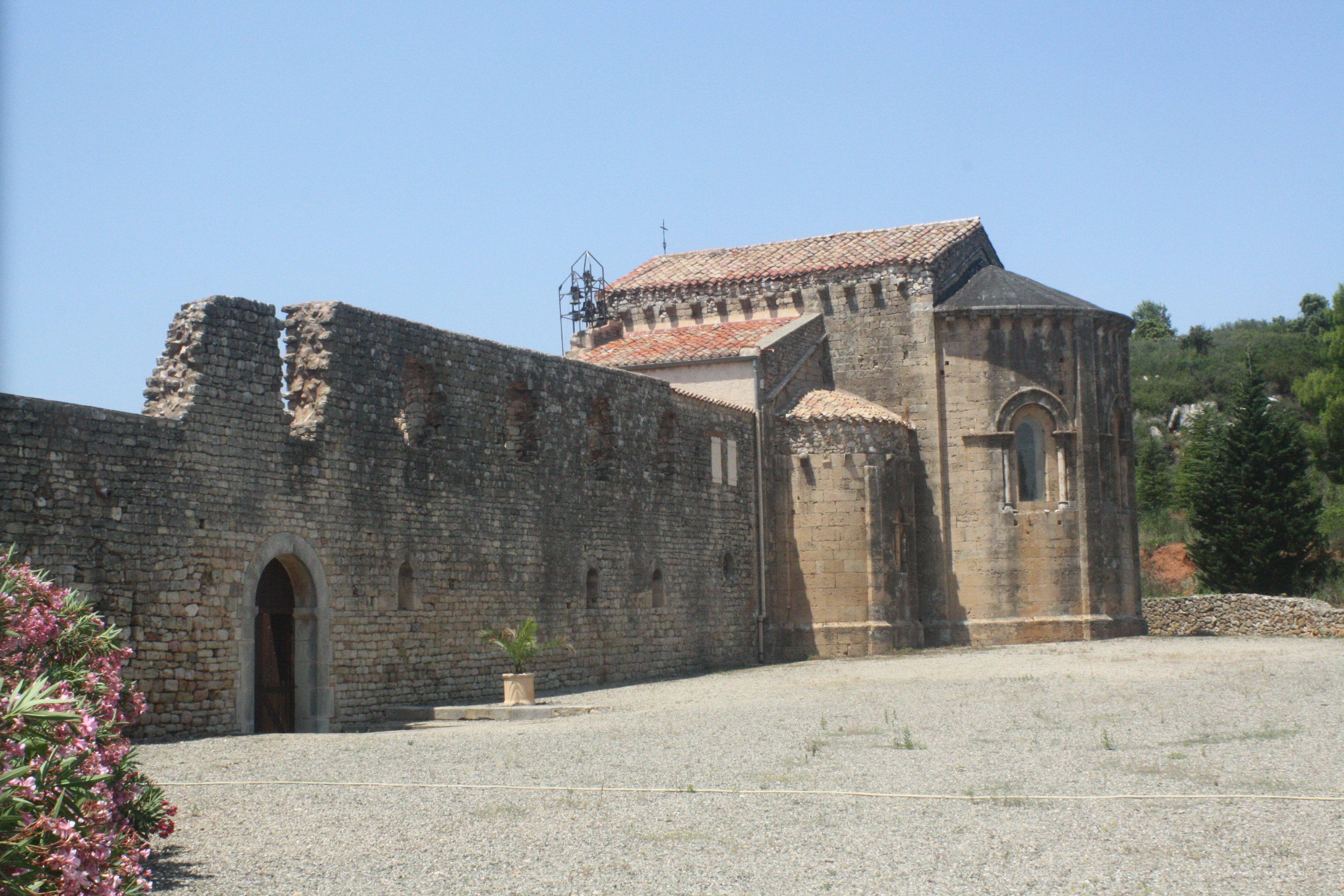 Cazedarnes (Hérault) - chevet de l'église abbatiale.